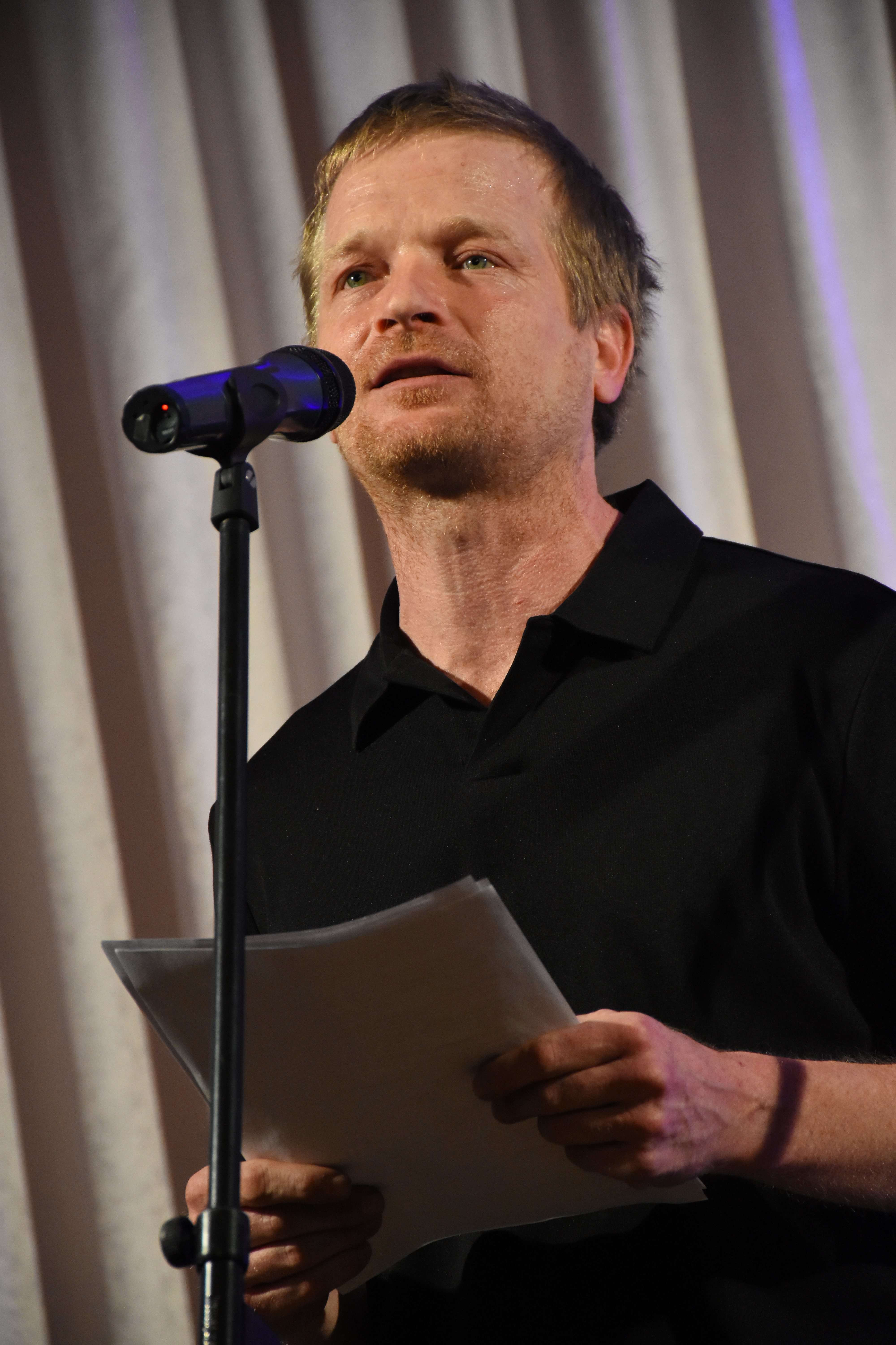 Setkání signatářů k 40. výročí Charty 77, Palác Lucerna, Praha, 7. ledna 2017Matěj Hádek